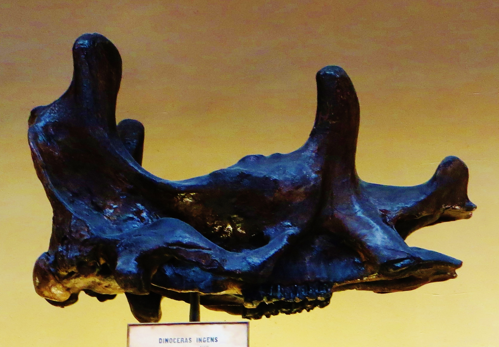 Fossil of Dinoceras, an extinct mammal - Took the photo at Musee d'Histoire Naturelle, Paris